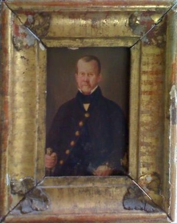 Estéban de Antuñano, fundador de la industria textil mecanizada en México. (1792-1847)